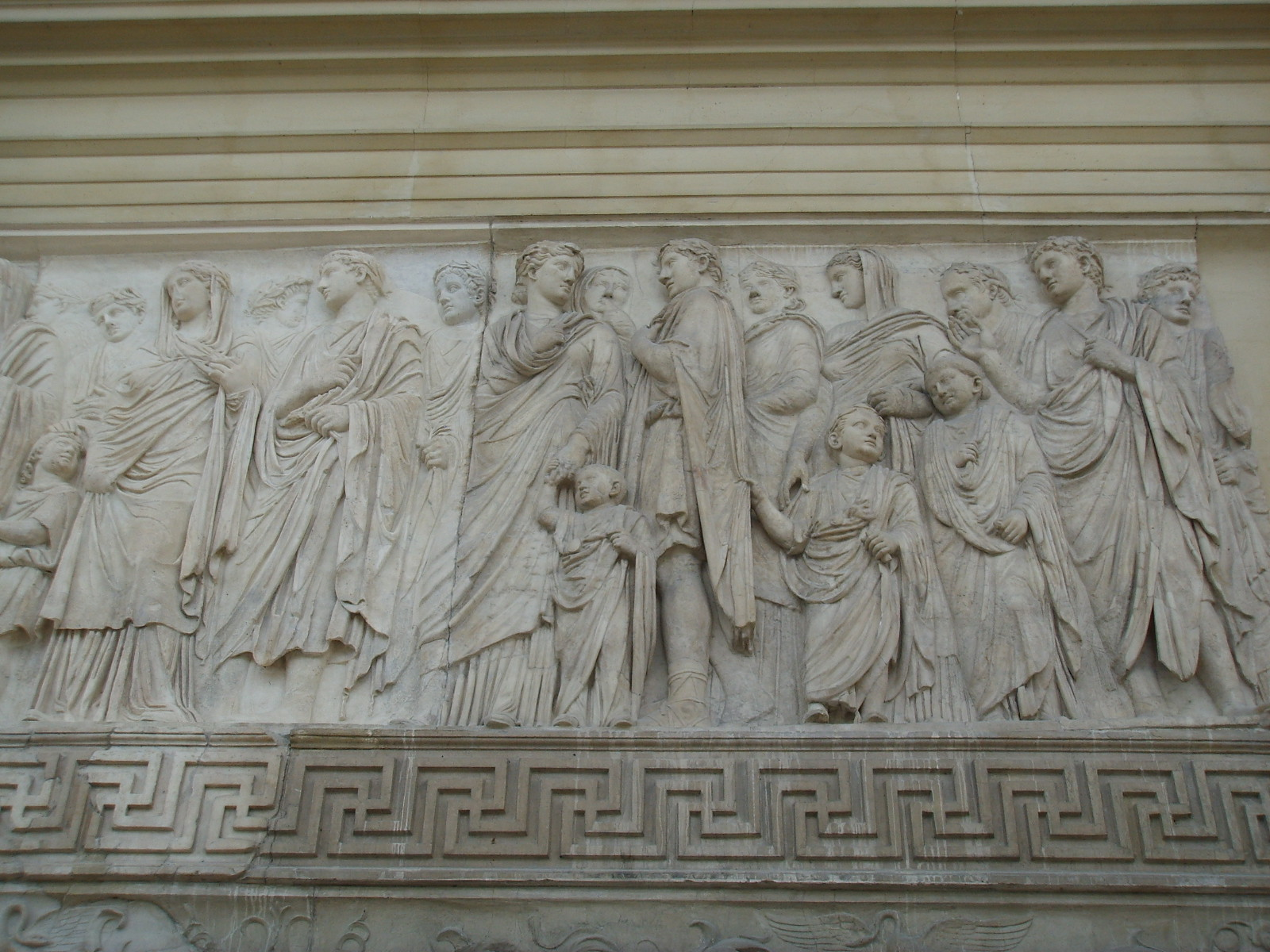 Ara Pacis, mur ouest 1 (Rome, Italie)